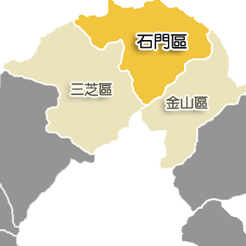 石門區相對位置。